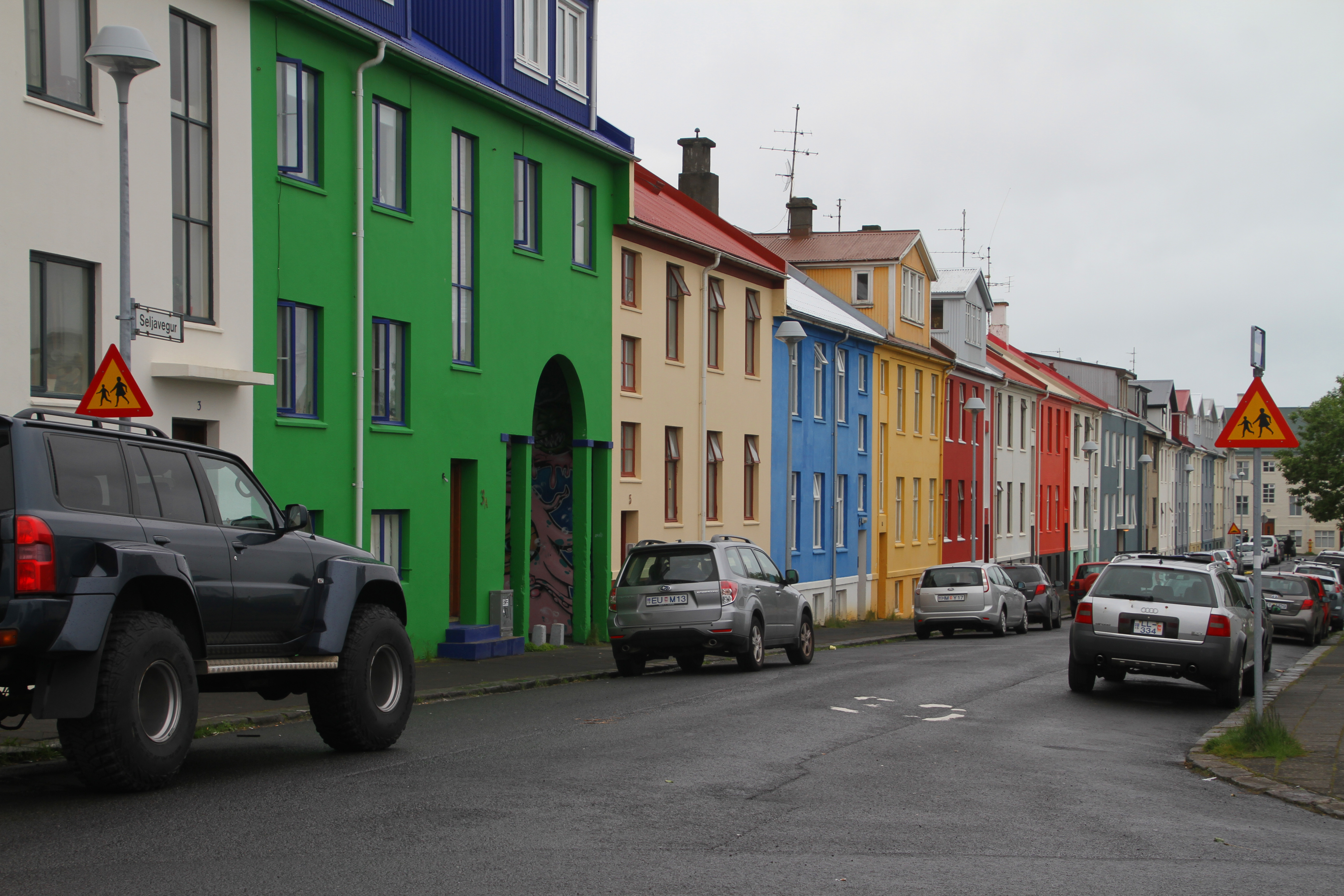 Reykjavík